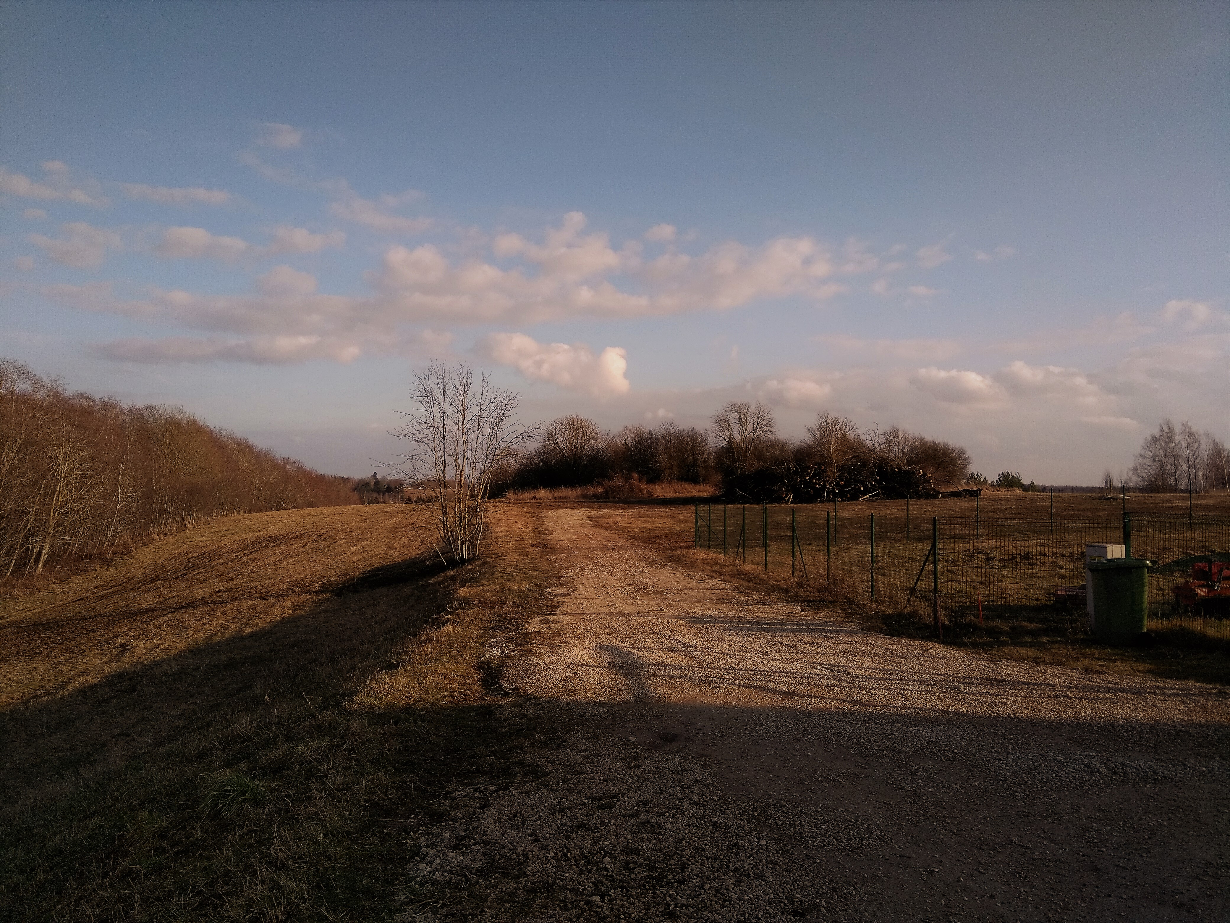 Vaade loodest linnuse maa-alale ja sinna viivale ühendusteele.